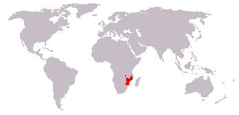 Bewerking afbeelding: Afbeelding_(kaart).JPG